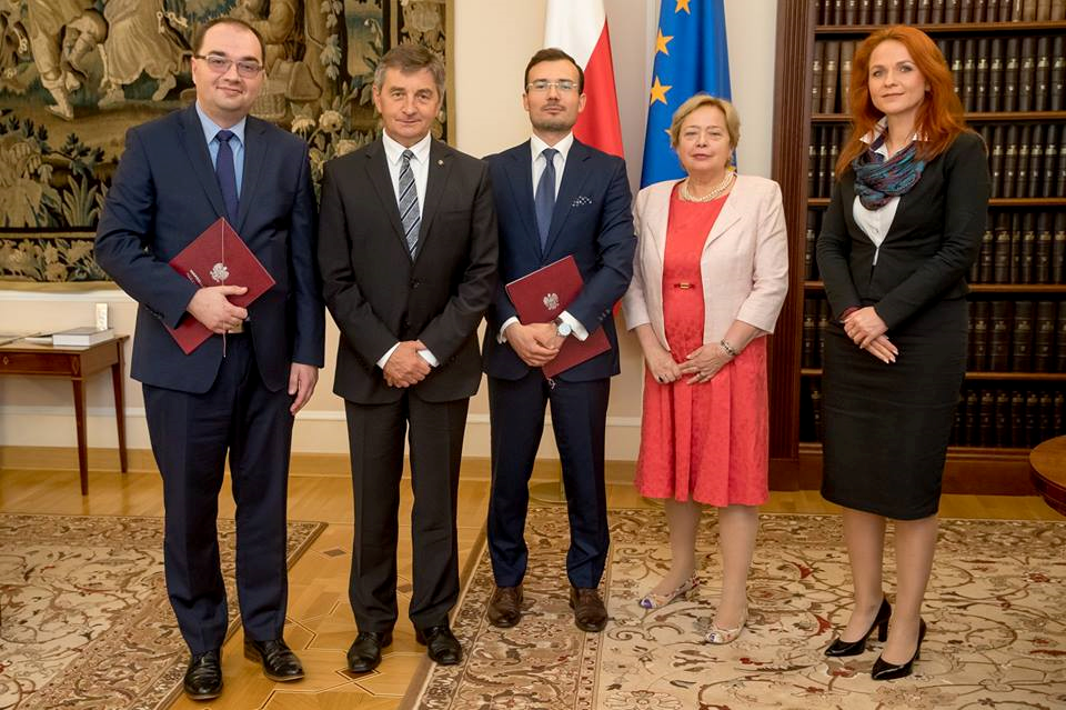 Maciej Zaborowski (w środku) podczas wręczenia aktu powołania na sędziego Trybunału Stanu, 2018 r.